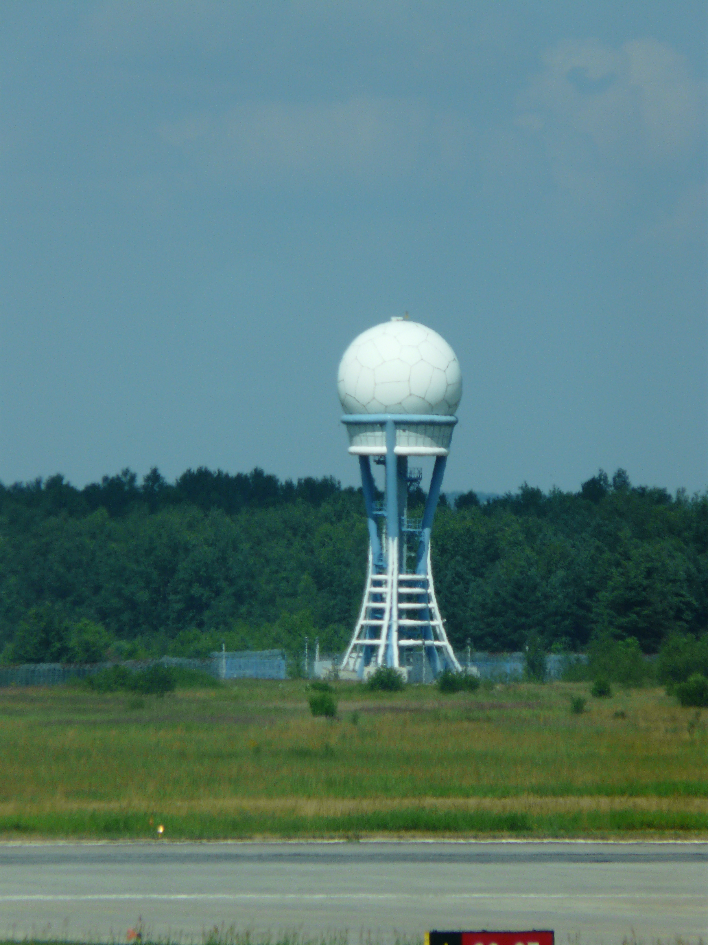 Katowice-Pyrzowice Airport